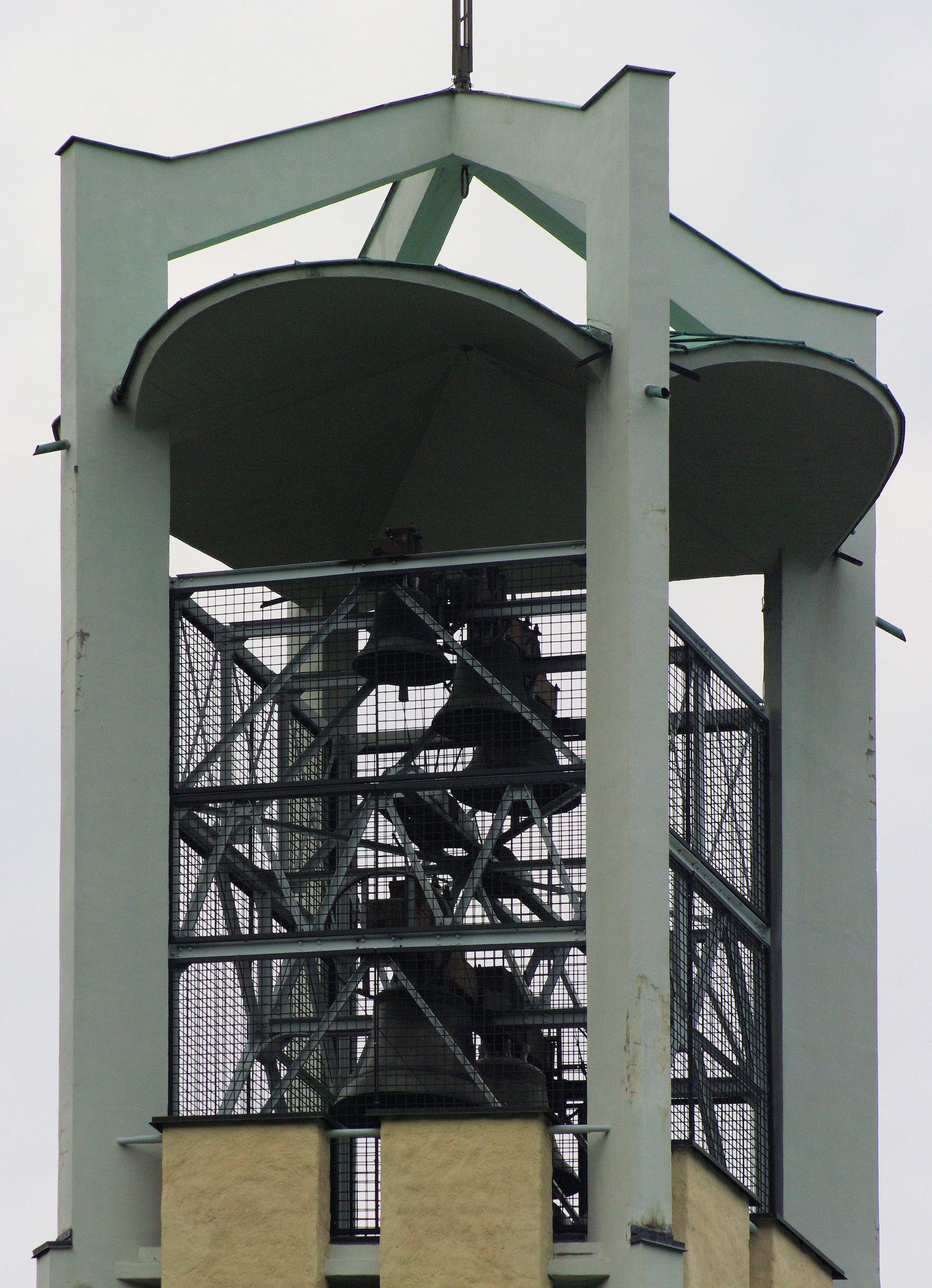 Ludwigskirche